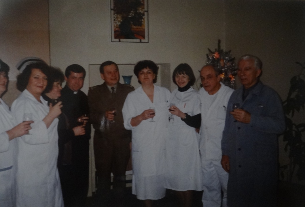 Dowódca 45 Batalionu Medycznego na spotkaniu z pracownikami batalionu